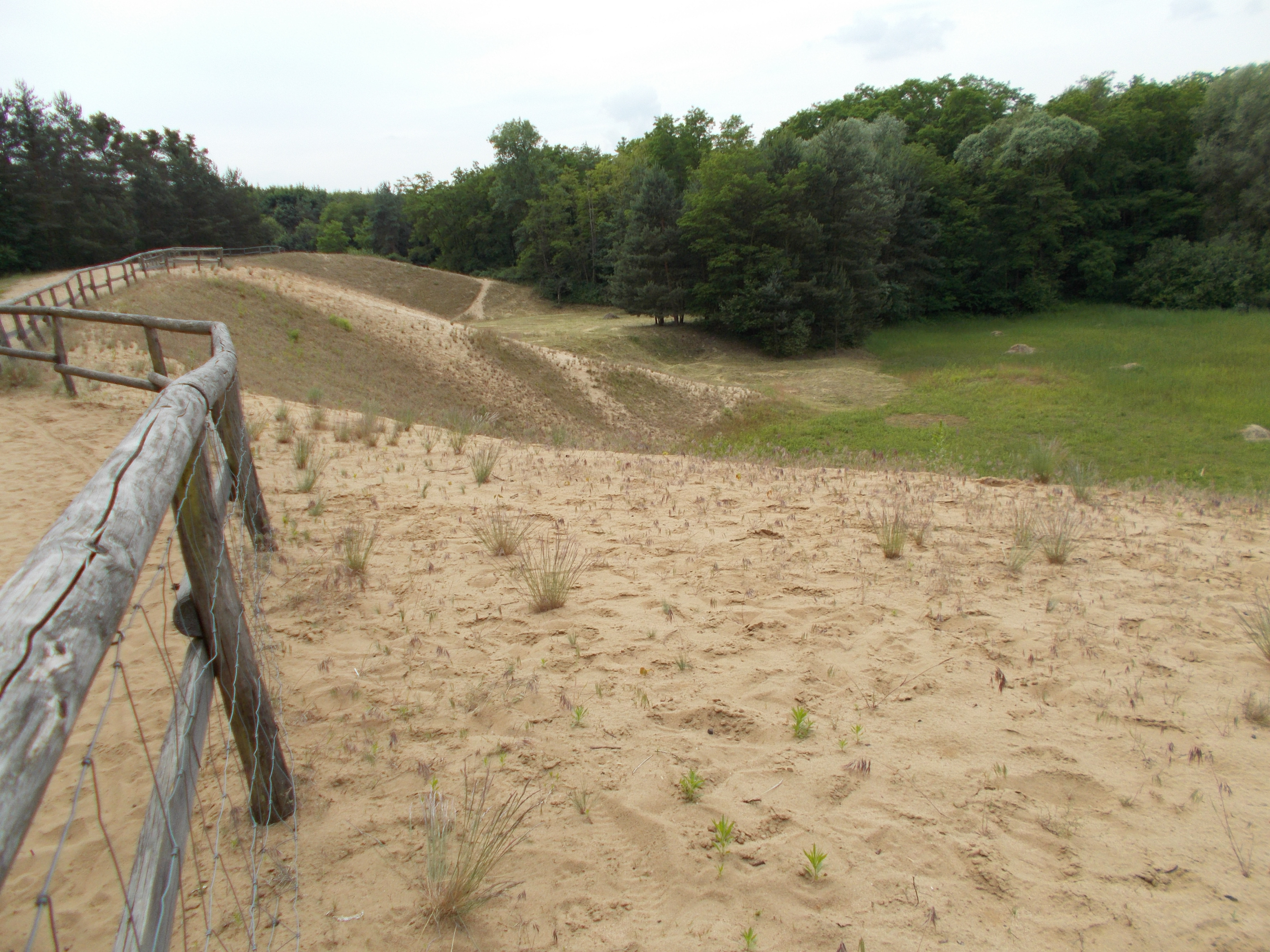 Naturschutzgebiet Zugmantel-Bandholz (NSG 2088), Dünenwall im Süden